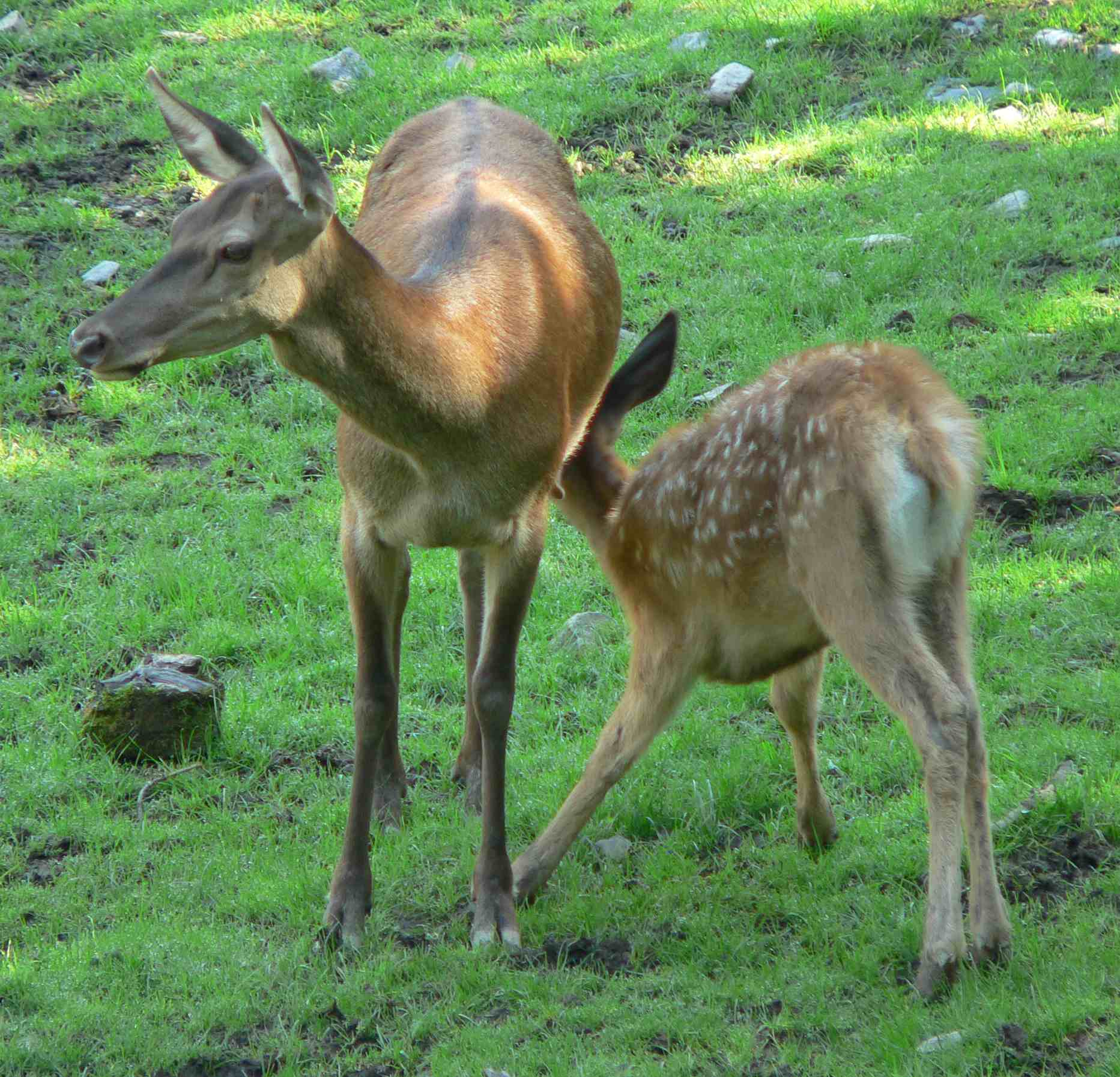 Cervus elaphus, nursing